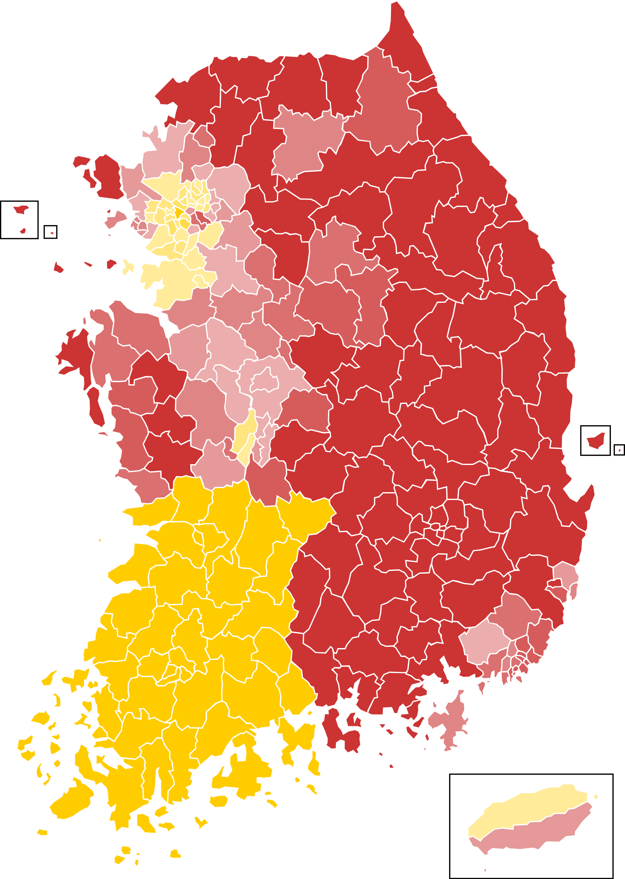 전주 일반구 통합